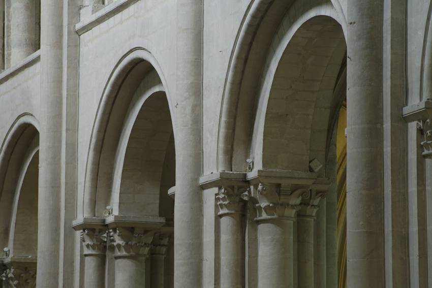 This building is en partie classé, en partie inscrit au titre des Monuments Historiques. .